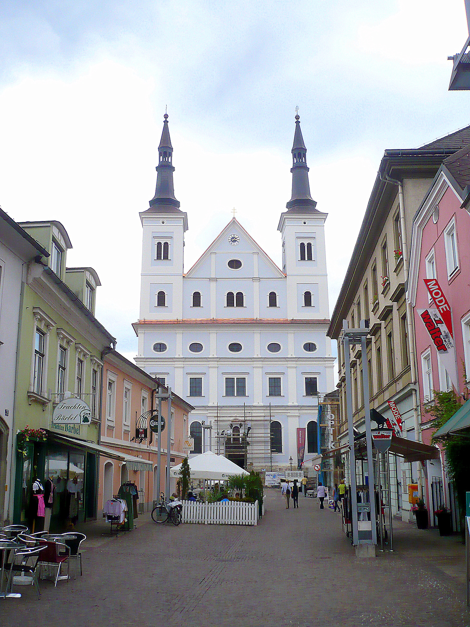 Leoben Pfarrkirche St.Xaver